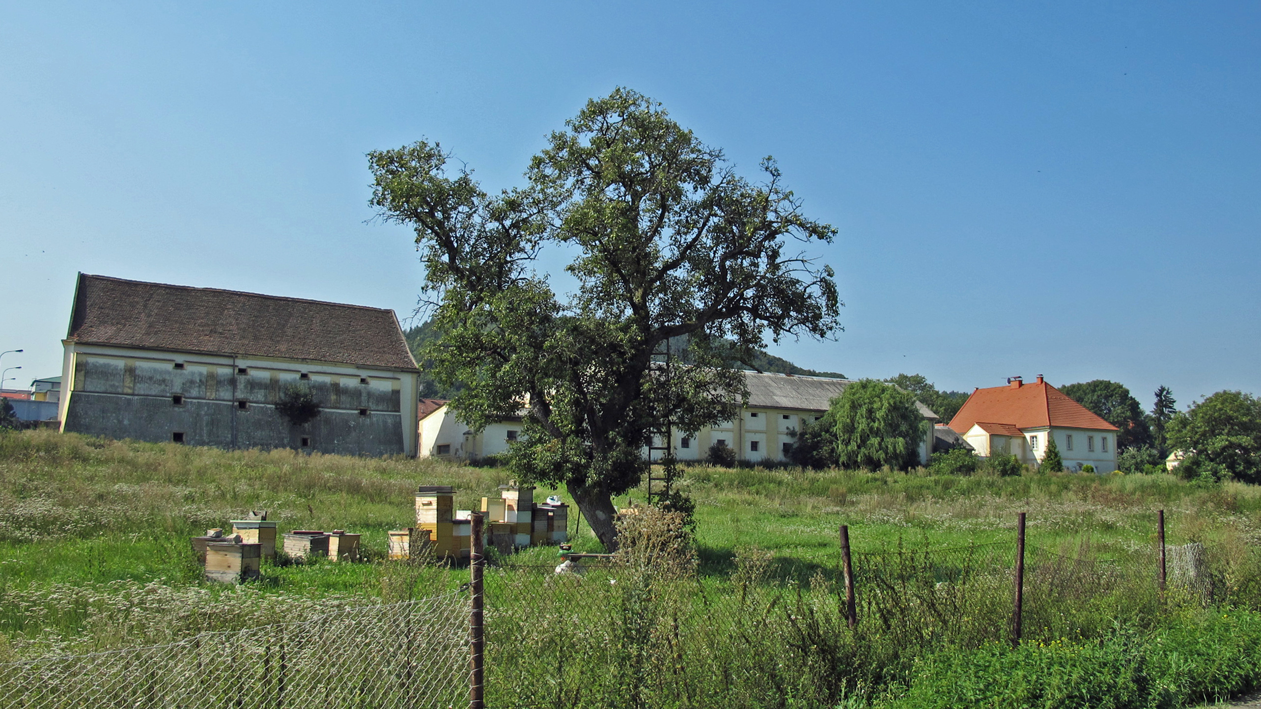 Tvrz (Bělušice), Bělušice 1 (objekt zcela vpravo)